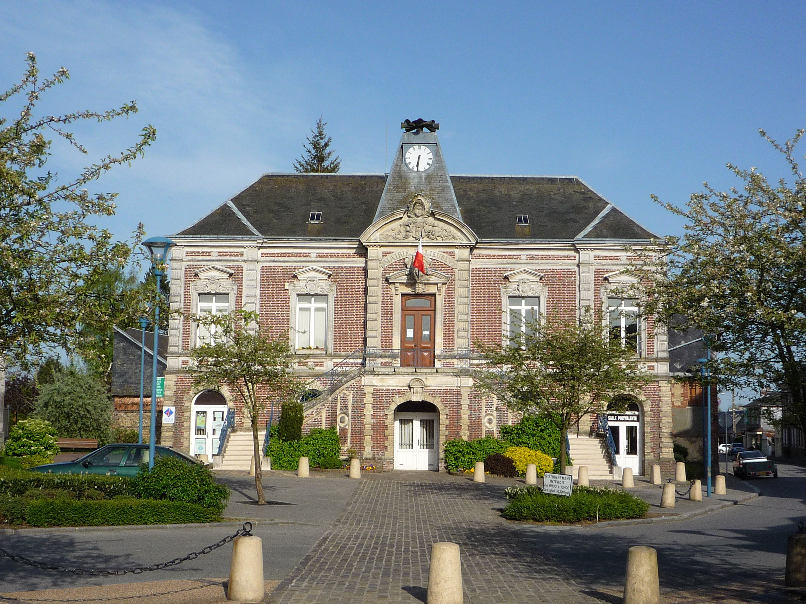 Mairie de Lieurey